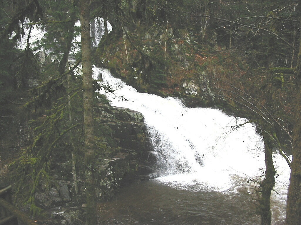 Le Saut du Bouchot à Gerbamont (département des Vosges). Le Bouchot est un affluent de la Moselotte. Photo personnelle du 16 avril 2006. Copyright © Christian Amet